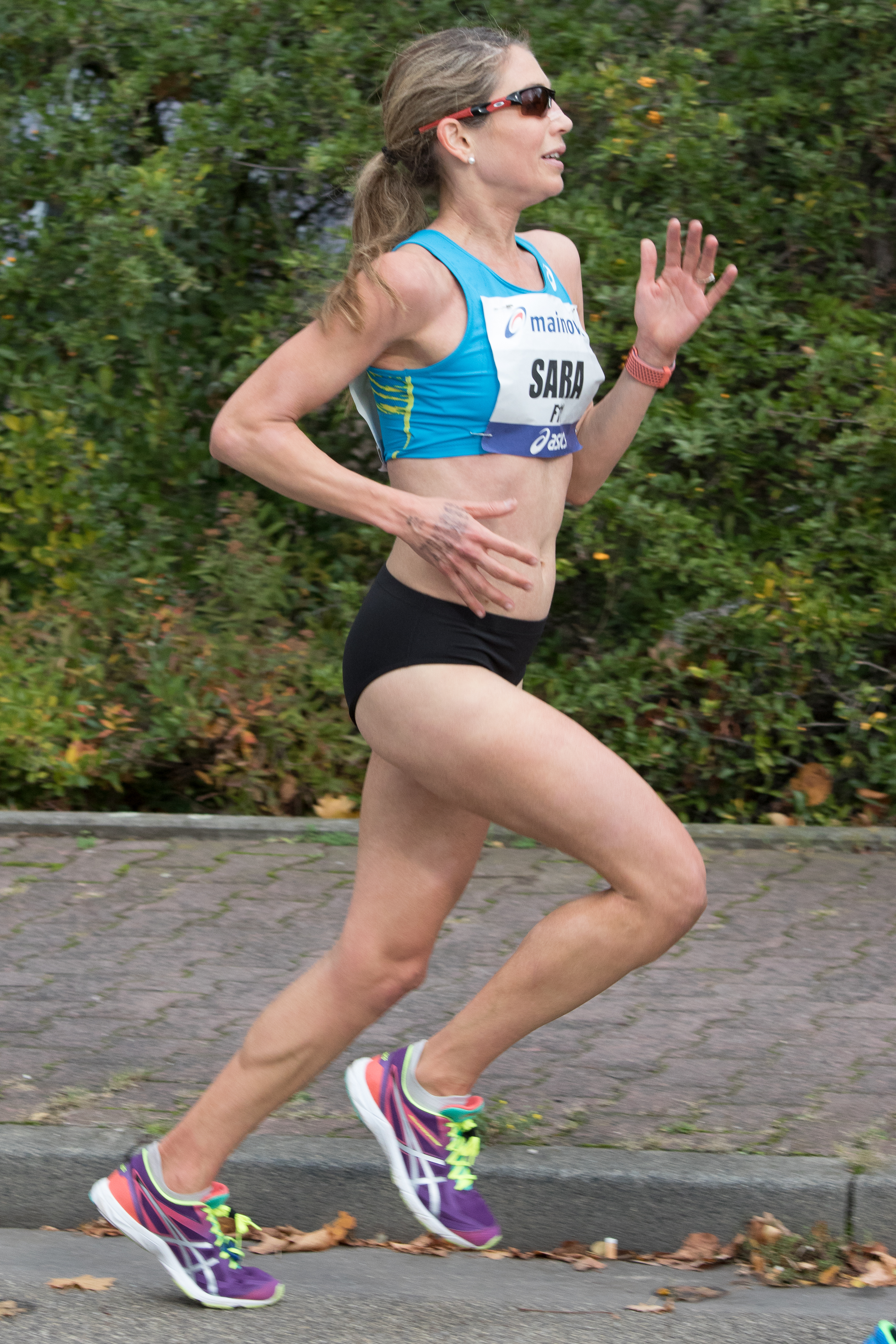 Sara Hall, Frankfurt Marathon 2017